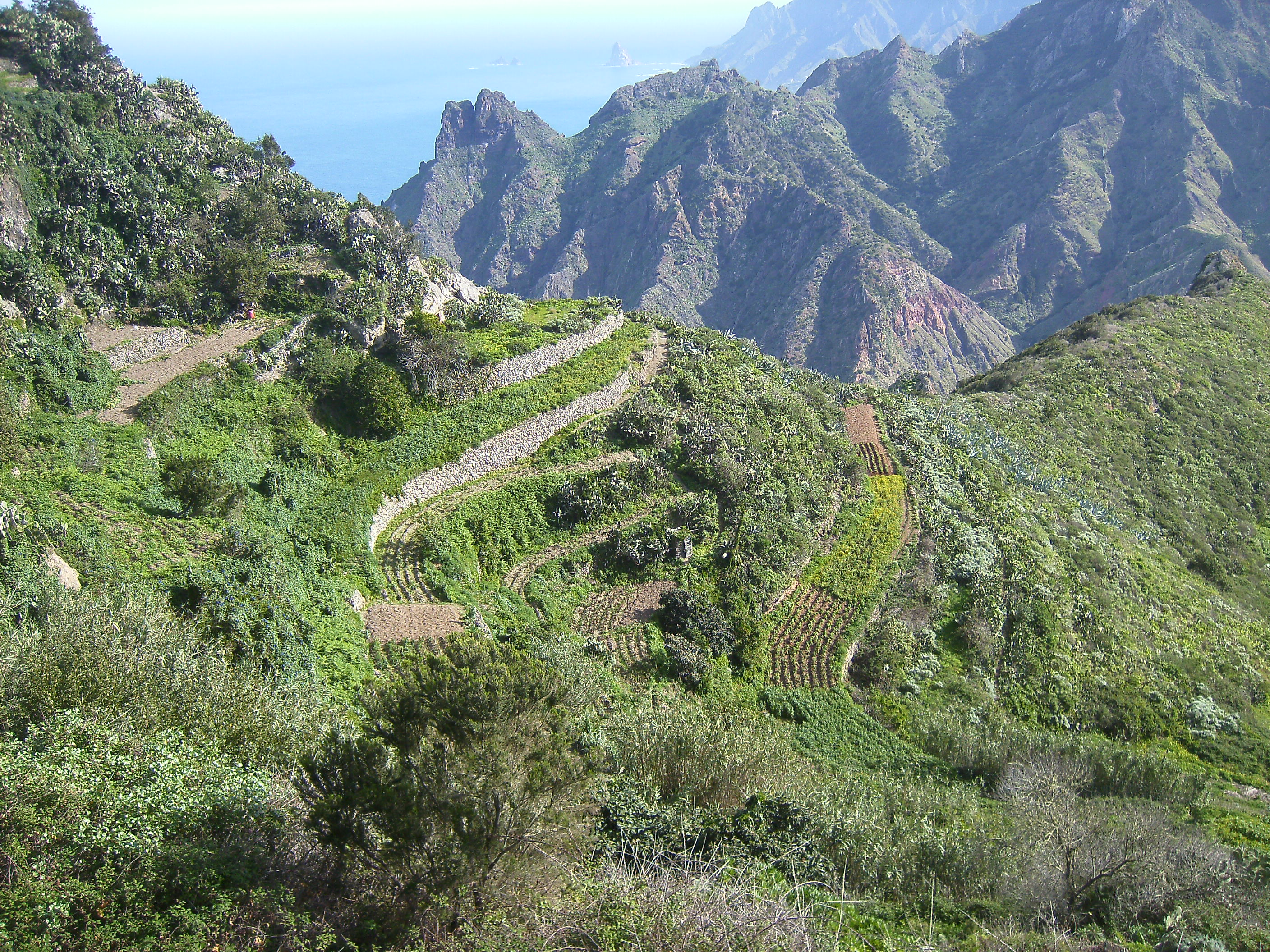 Cultivos en bancales en Taborno, Anaga (Tenerife).